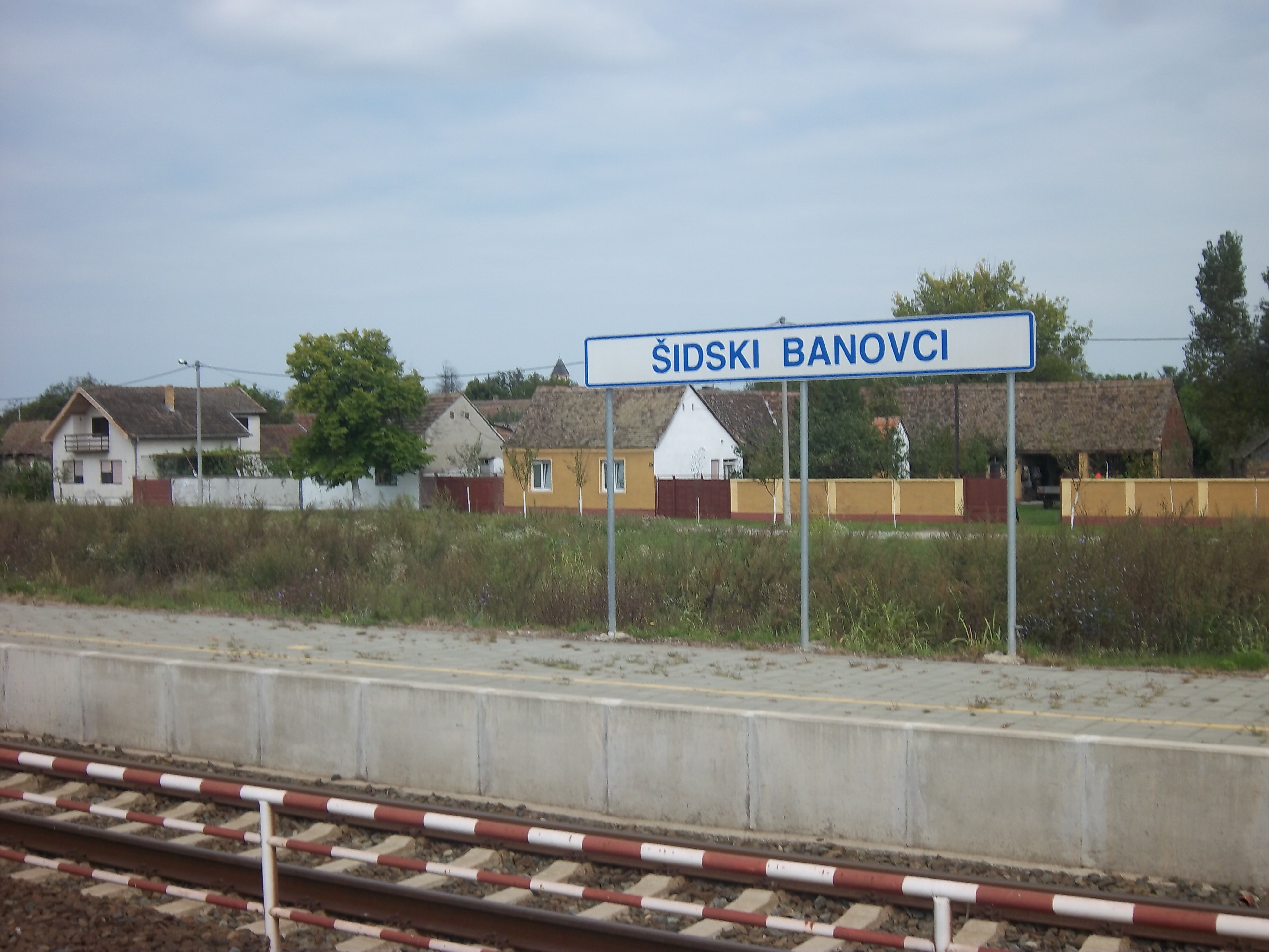 Srpskohrvatski / српскохрватски: Željeznička stanica u naselju Banovci u Vukovarsko-srijemskoj županiji.